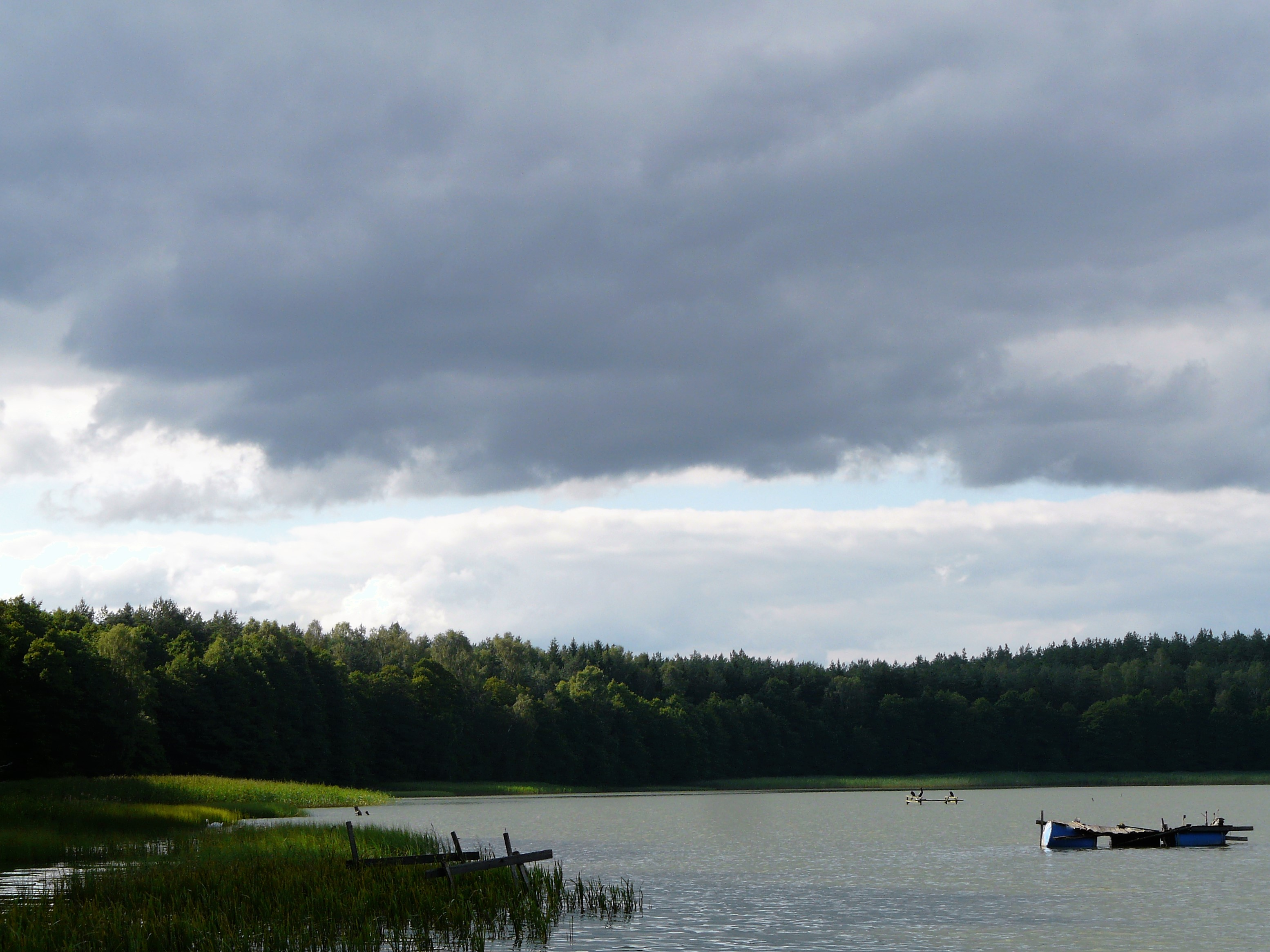 Obszar specjalnej ochrony ptaków: Puszcza Napiwodzko-Ramucka This is a photography of protected area with CRFOP ID PL.ZIPOP.1393.N2K.PLB280007.B